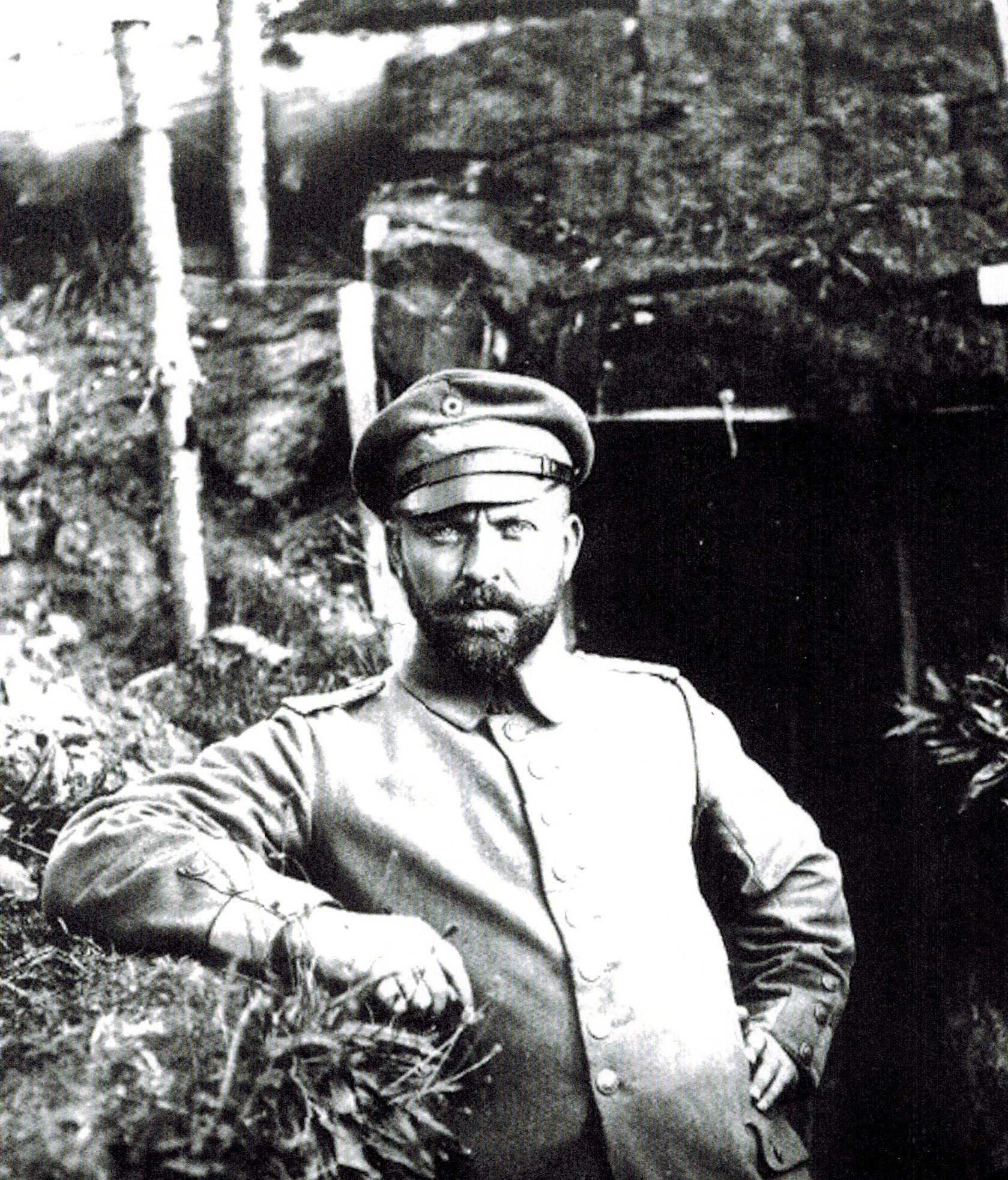 Ernst Lübbert (1879–1915) im Ersten Weltkrieg